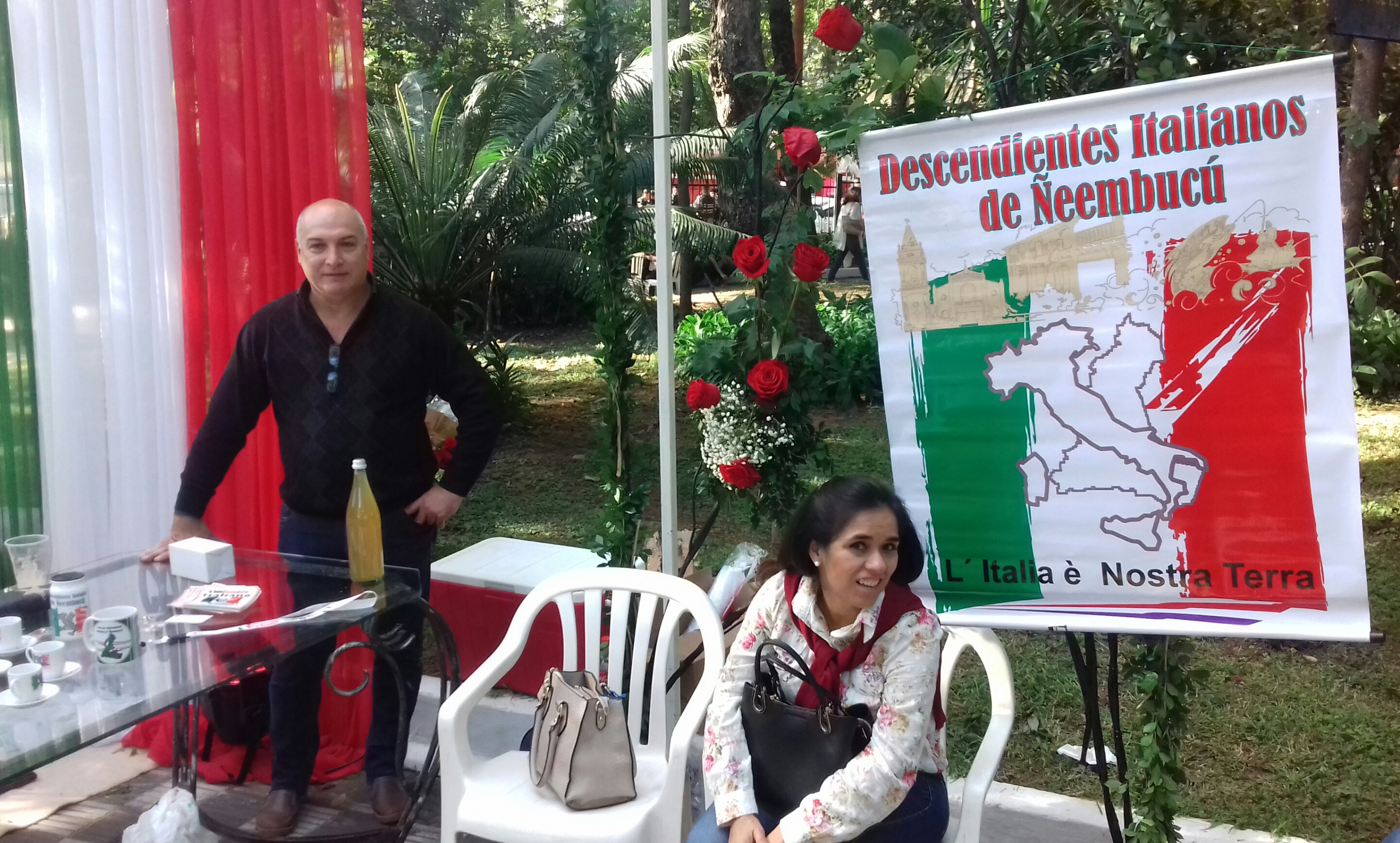 Fotografía obtenida durante la 3° edición de la Fiesta Italiana en Asunción, Paraguay (2019).